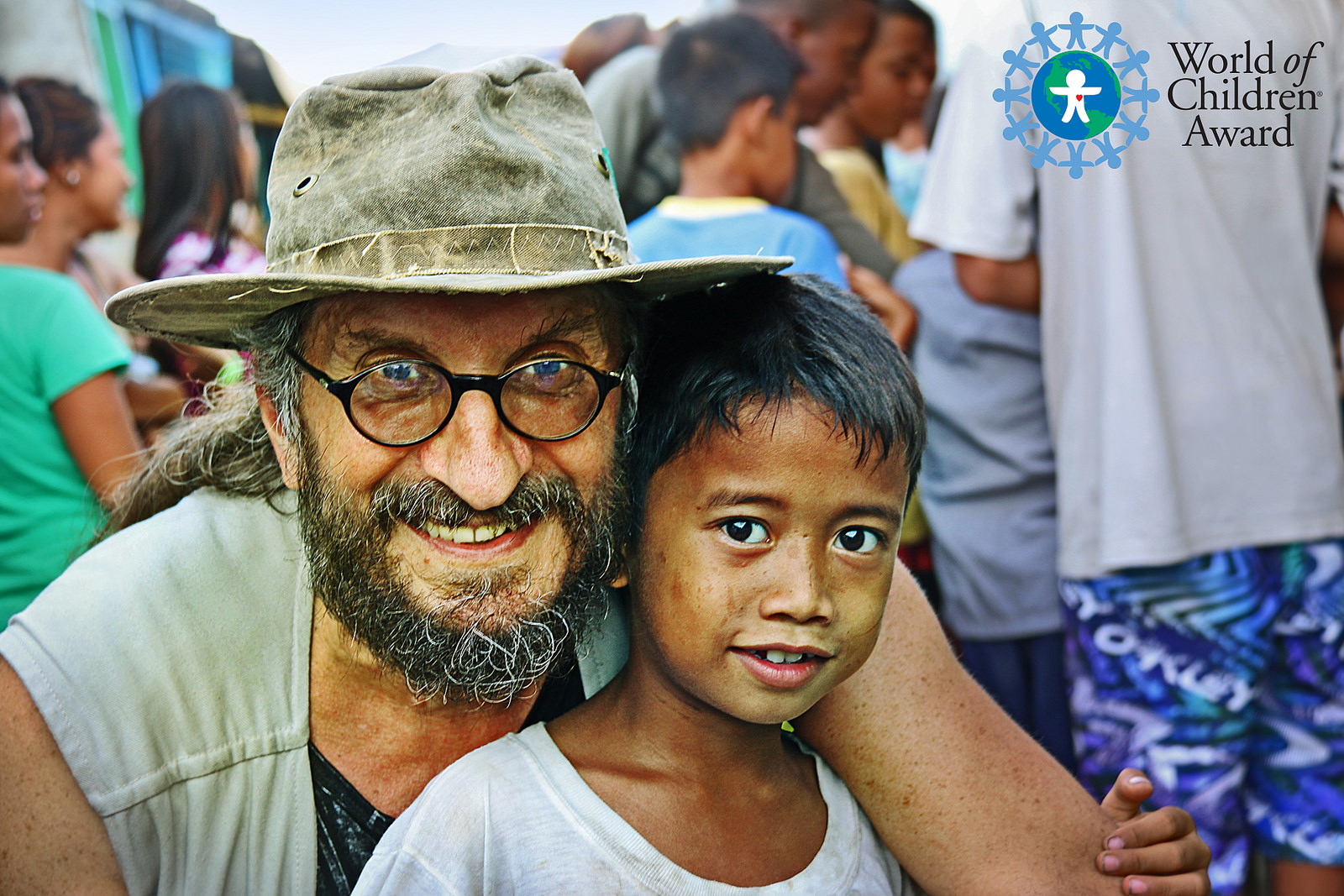 Gregory John Smith - grunnlegger av Children At Risk Foundation